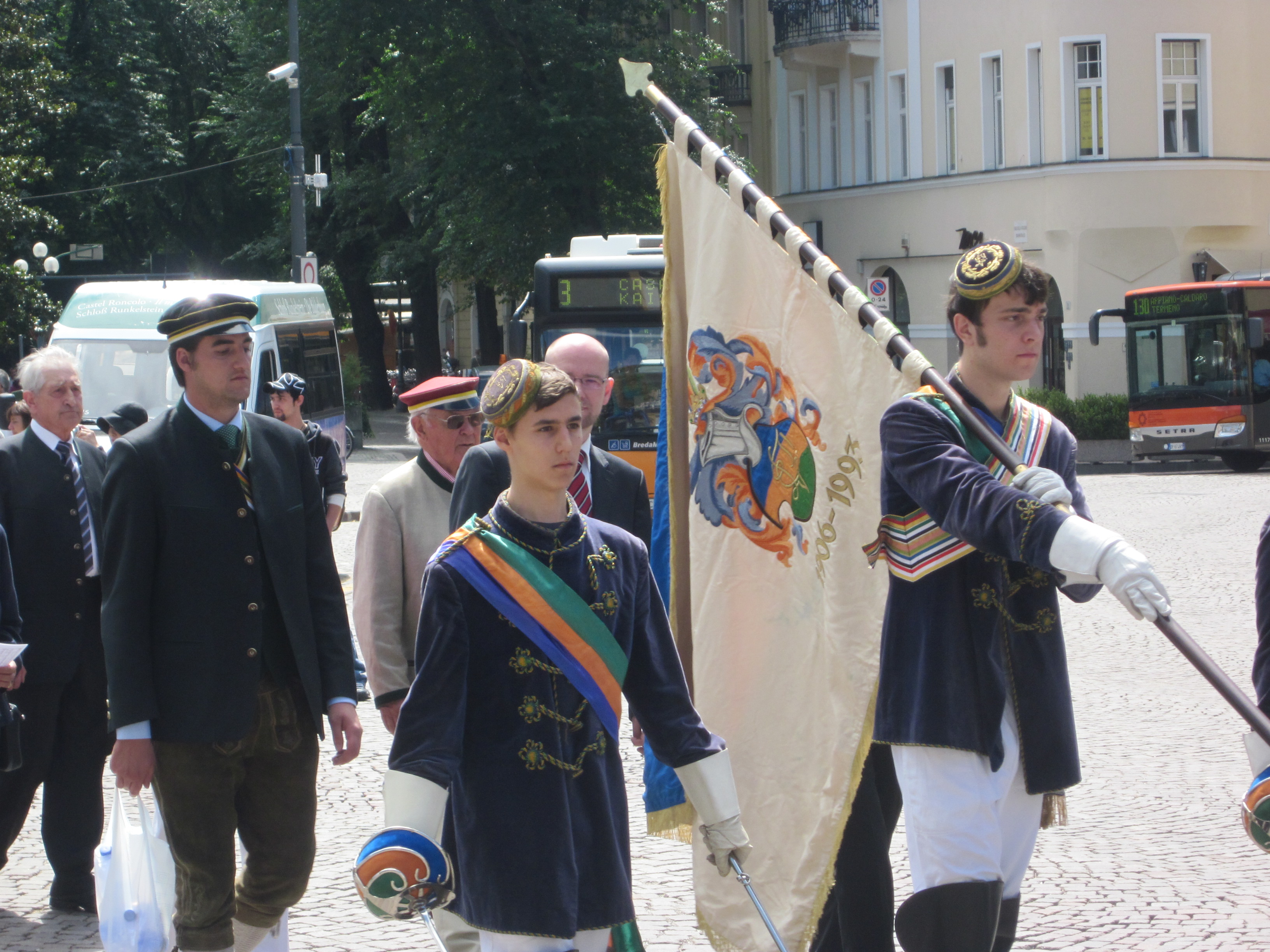 K.M.V. Laurins Tafelrunde Bozen, Aktive und Philister, bei der Herz-Jesu-Prozession 2011